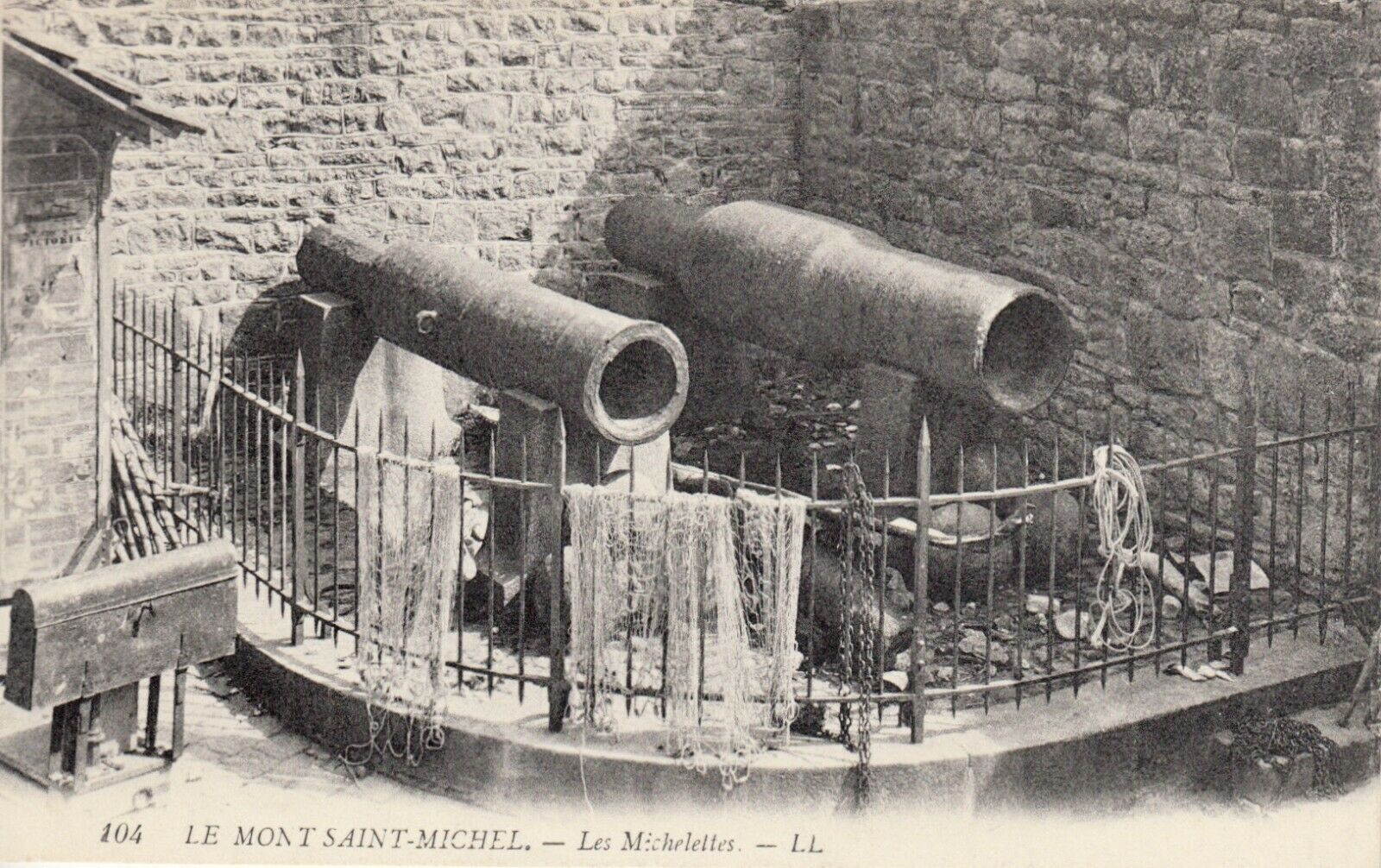 Bombardes anglaises du Mont-Saint-Michel. Balance d'octroi, à gauche. Éditions LL, vers 1910.